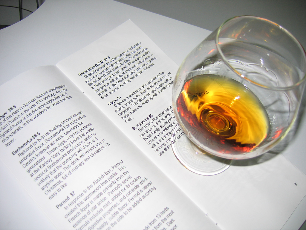 Glayva